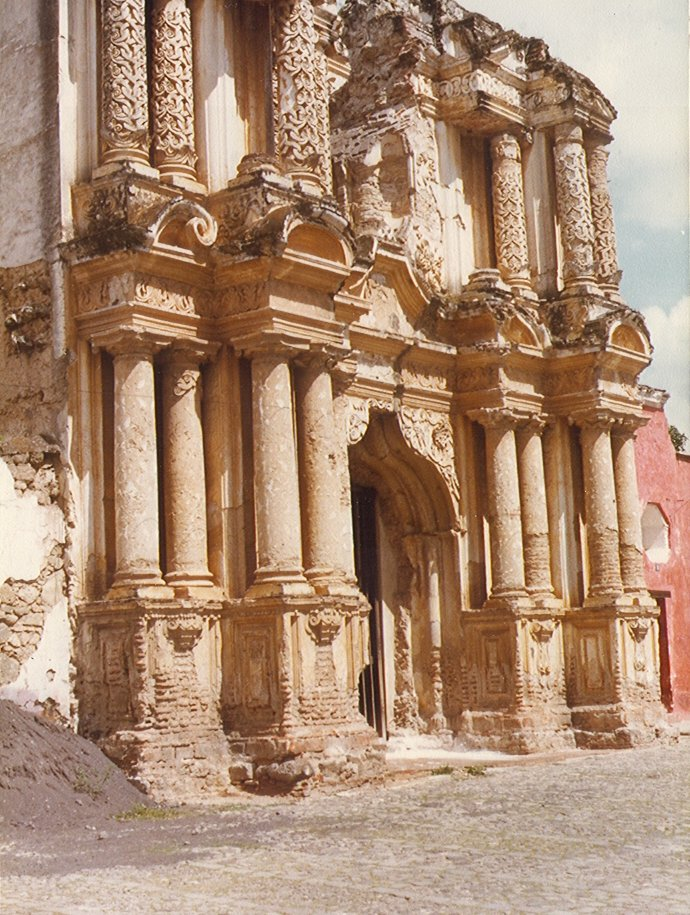 Antigua Guatemala. Colonial era church fascade. Infrogmation photo, 1980.